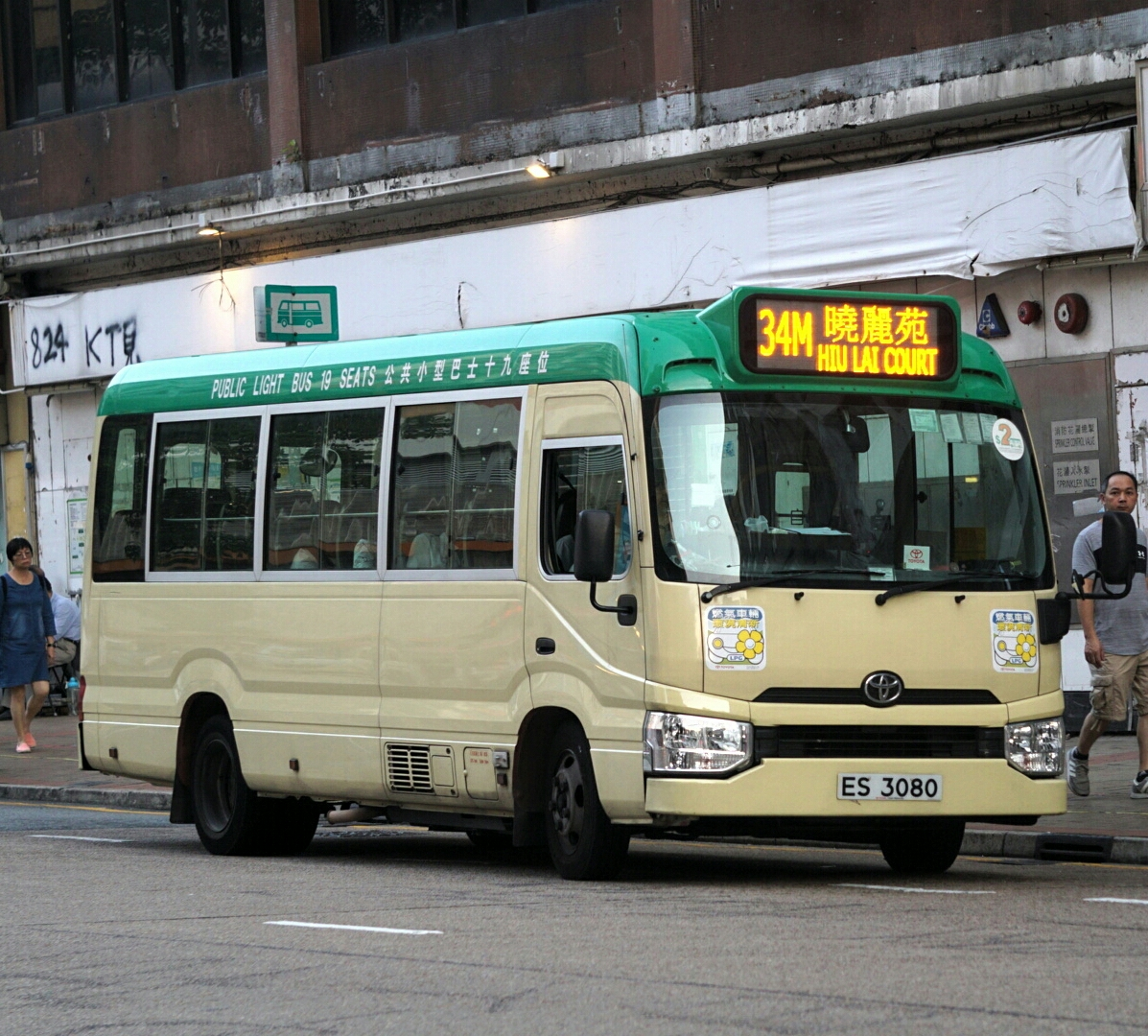 中文（香港）: 九龍區專線小巴34M線，正在裕民坊等待開出